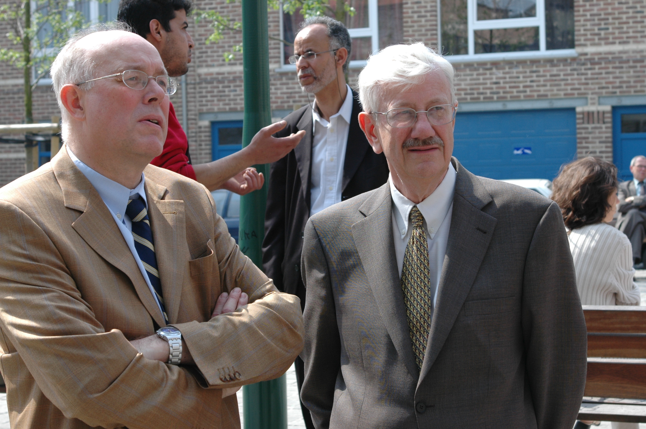 thumb|crop on Commons Inauguration du Centre d'entreprise de Molenbeek, en présence du Ministre Président Charles Piqué auteur de la photo L Glucksmann, qui octroye les droits d'utilisation pour la Fondation.